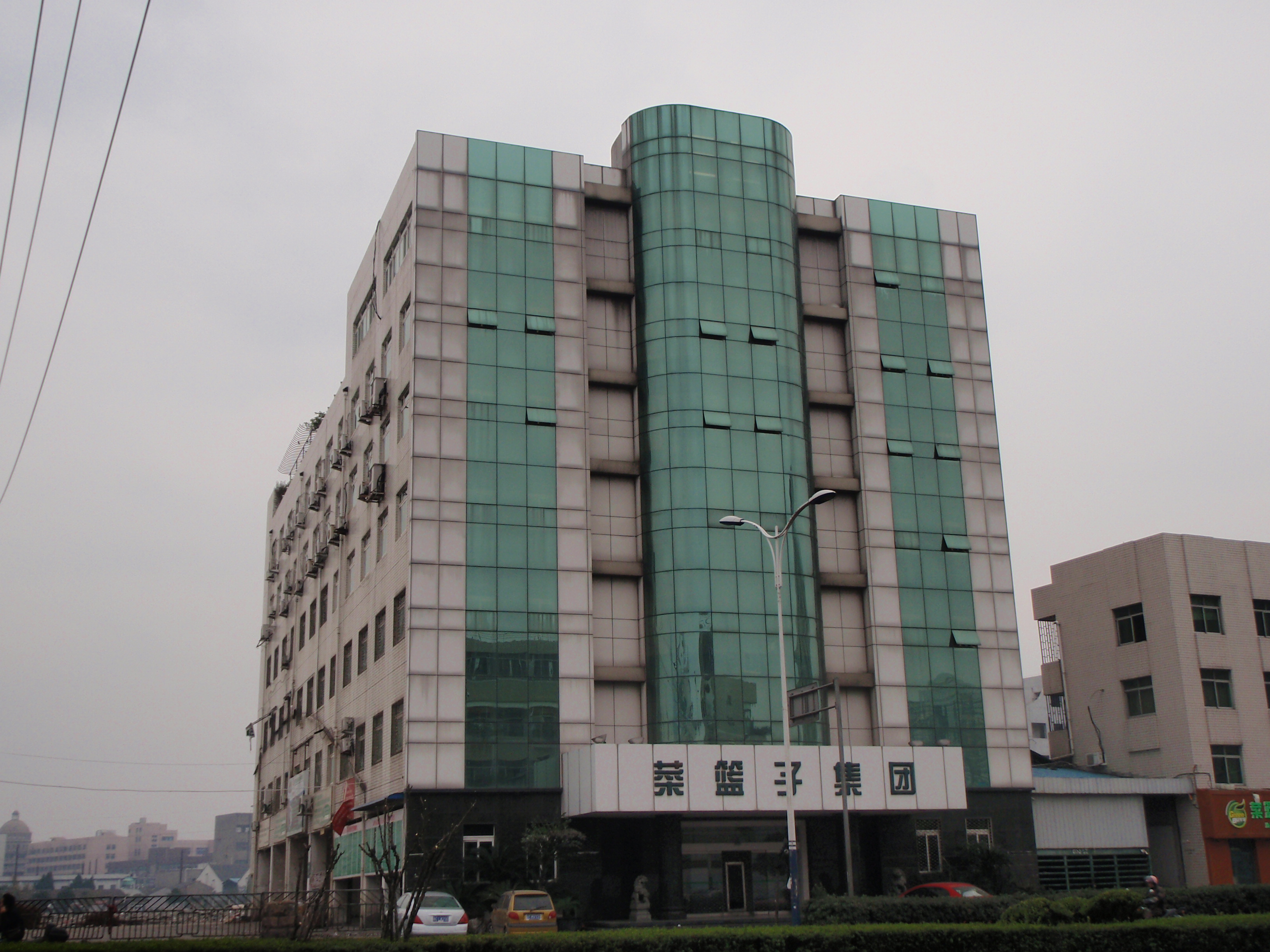 温州市菜篮子集团大楼